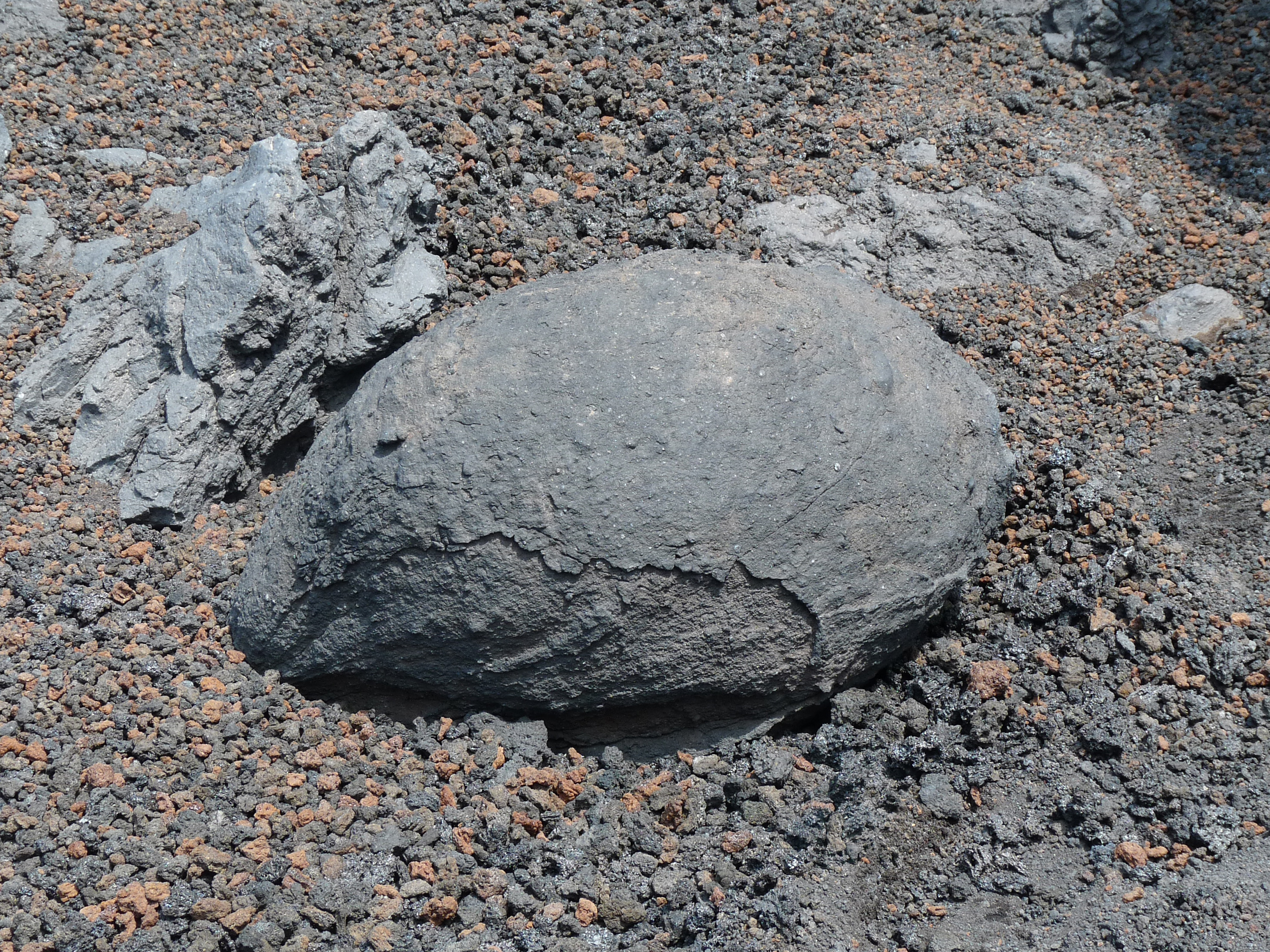 Bombe volcanique en fuseau sur le versant Sud de l'Etna (Sicile).